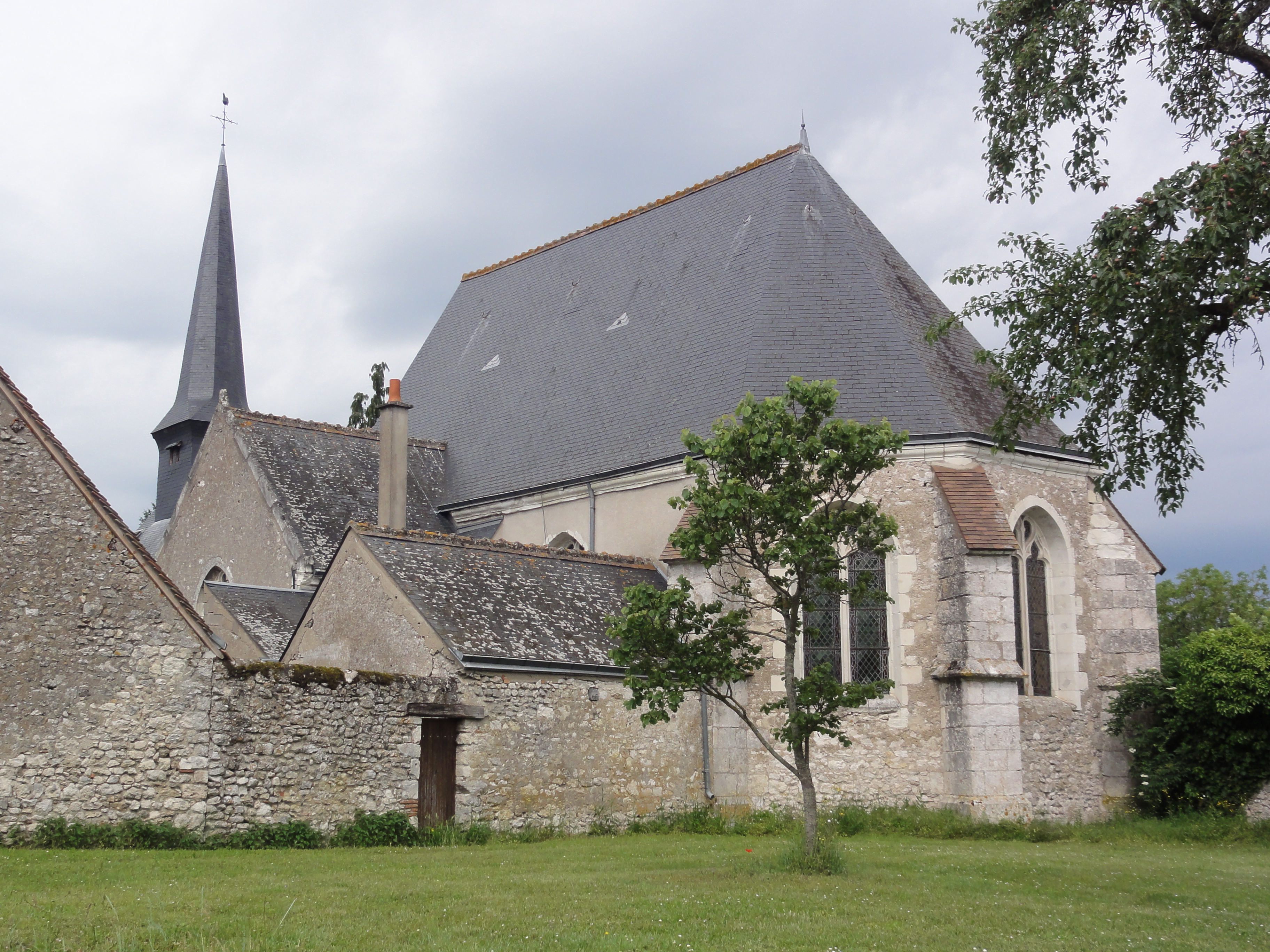 Muides-sur-Loire (Loir-et-Cher) Église